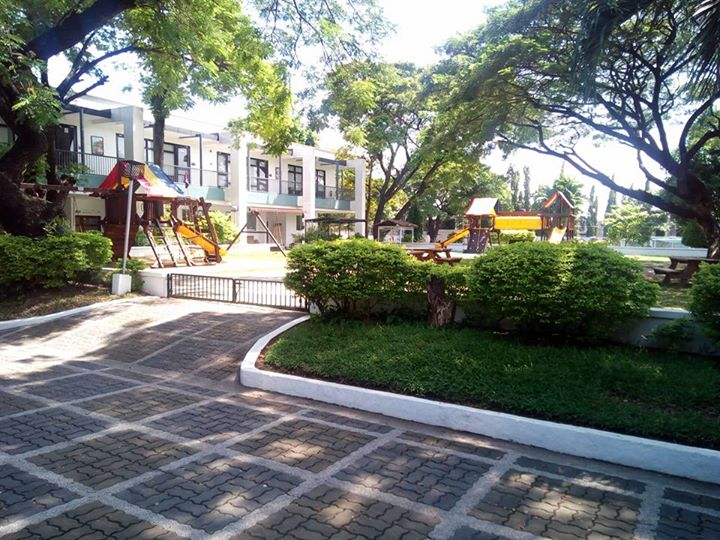 Das Bild zeigt den Bereich des Kindergartens im Mittelfeld und links die Gebäude des Kindergartens (unten) und der IB-Klassen und Büros (oben).